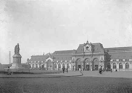 La gare de Mons vers 1930